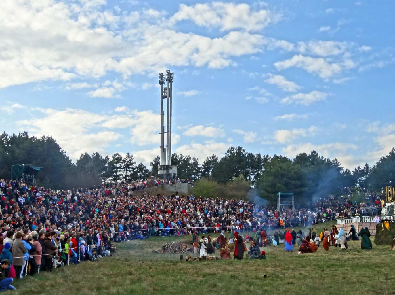 Misterium Męki Pańskiej w Dolinie Śmierci w Bydgoszczy 2014